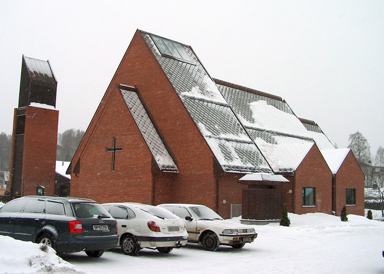 Ullerål kirke (Ullerål Church, Ringerike, Buskerud, Norway), northeast view Photo: T. Bjornstad, 2006-2-28